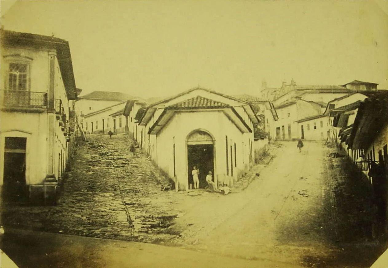 Azevedo, Militão Augusto de Ladeira do Ouvidor - Largo São Francisco , ca. 1860 Biblioteca Guita e José Mindlin (São Paulo, SP)